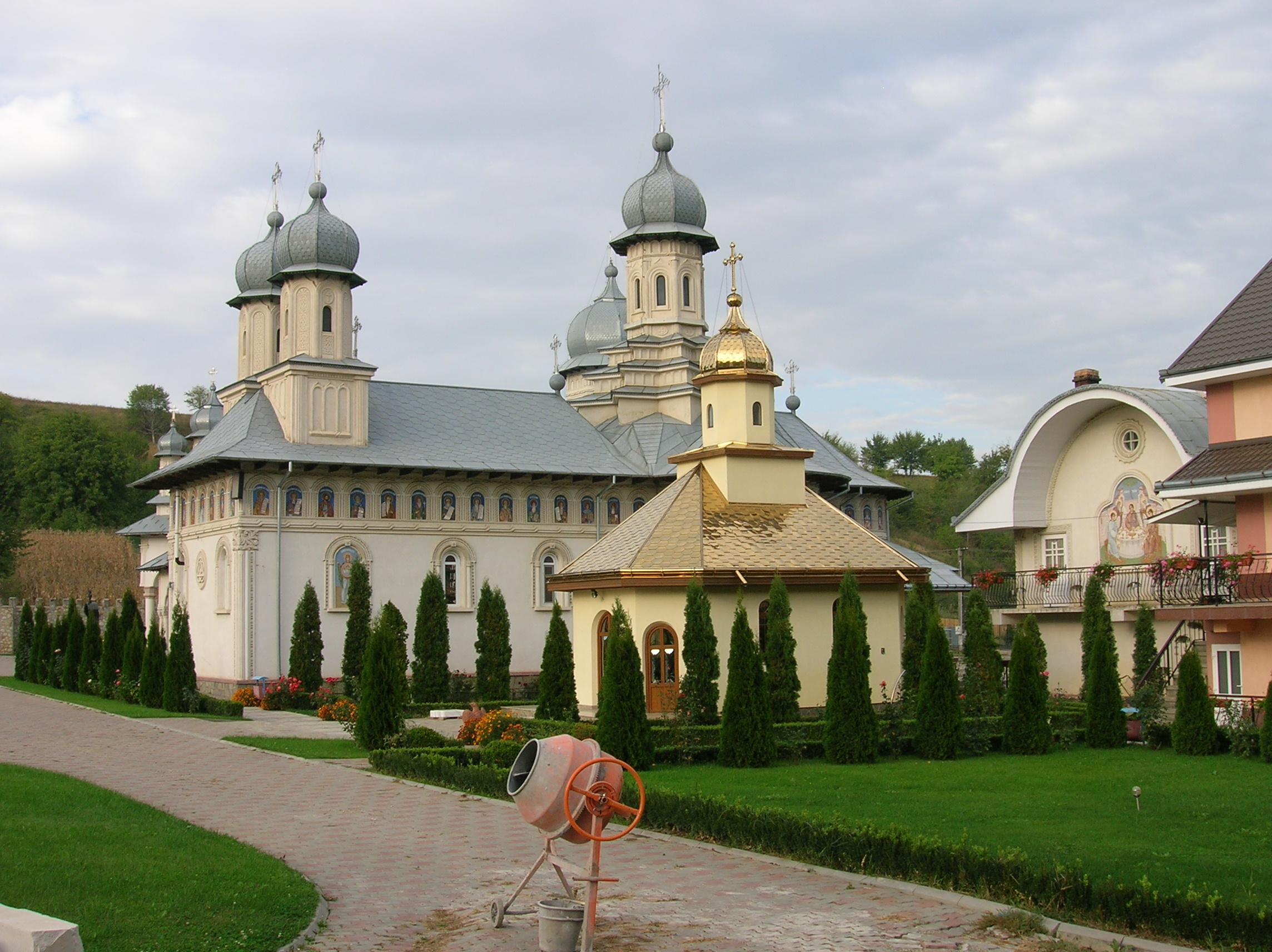 Comuna Valea Seacă Bacău - Satul Cucova - Mănăstirea Sfânta Treime (stil vechi) - Capela